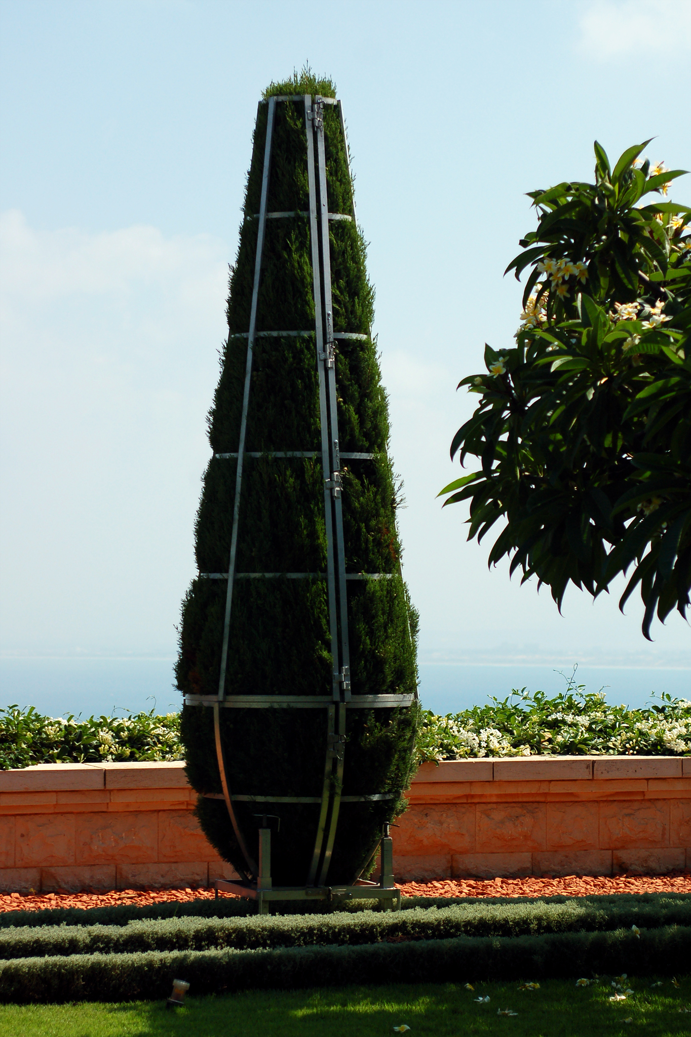 see title